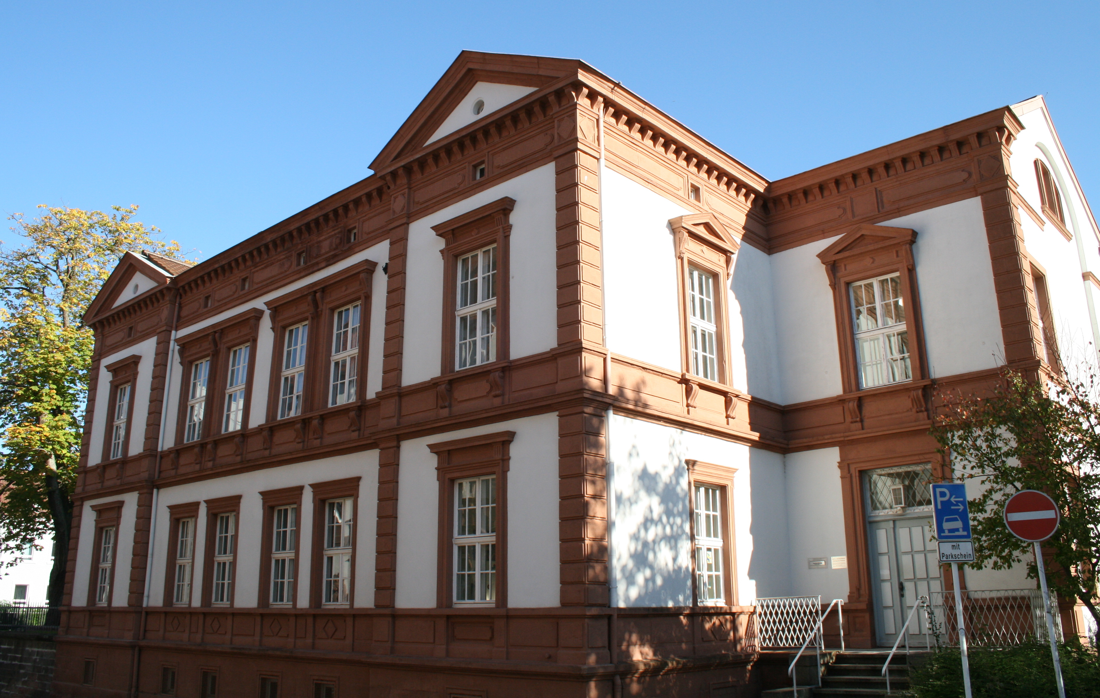 ehemaliges Wohnhaus (?); villenartiger spätklassizistischer Bau, um 1880, heute Arbeitsgericht